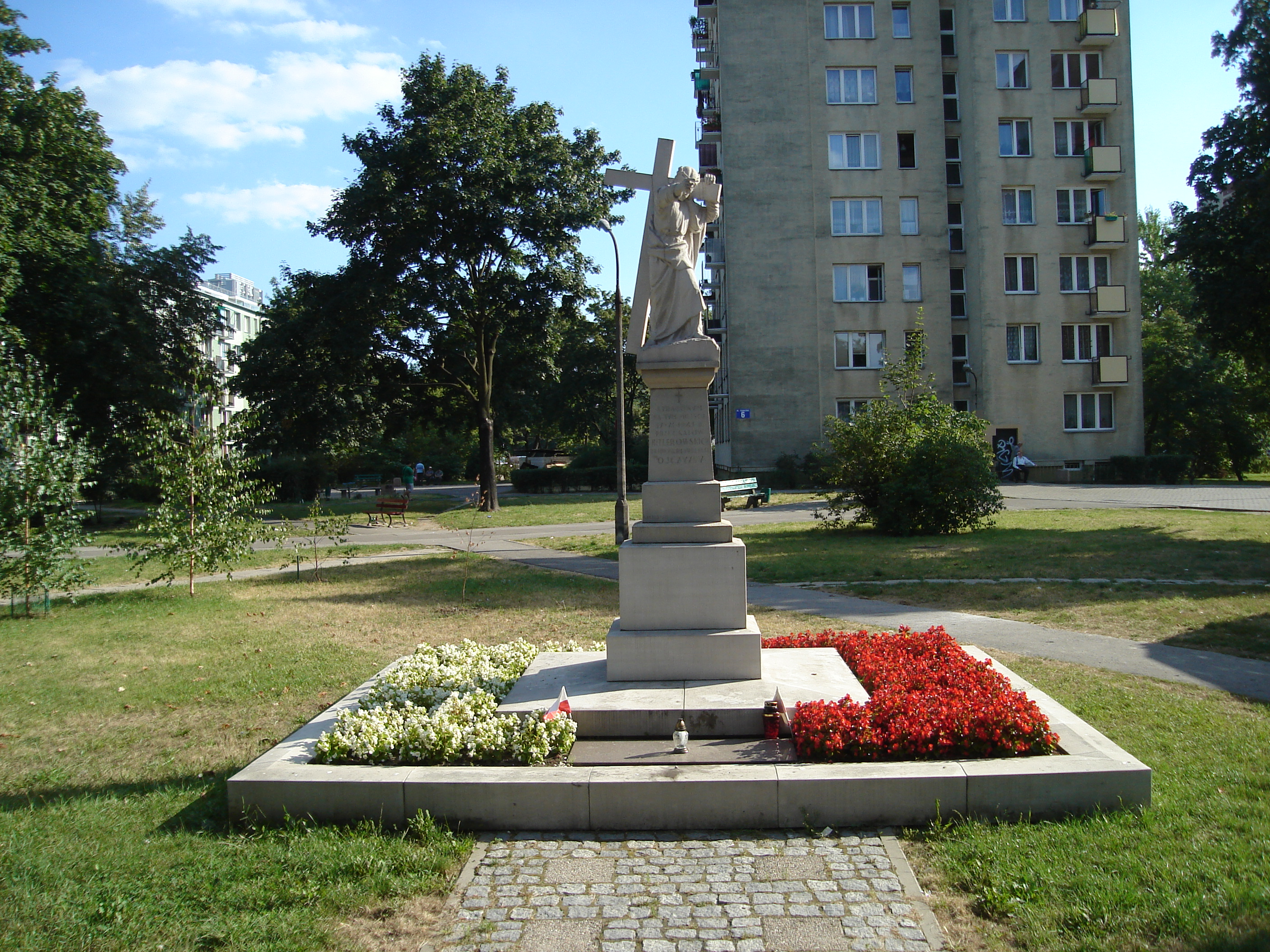 Pomnik na ulicy Suwalskiej